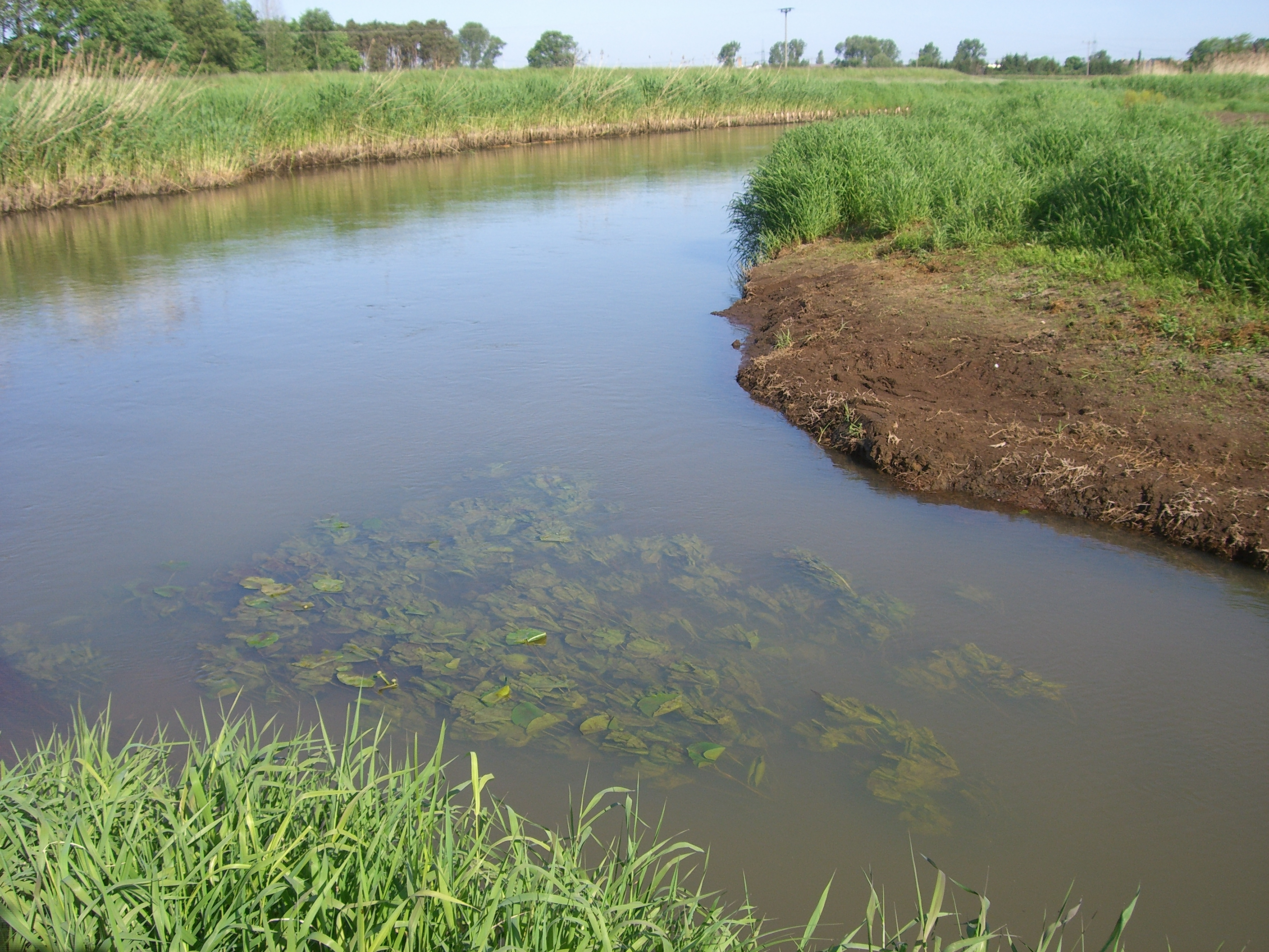 Einmündung der Kremitz in die Schwarze Elster